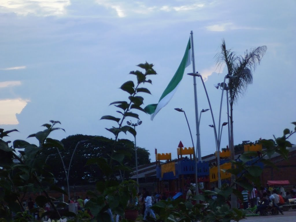 Bandera de Agustin Codazzi